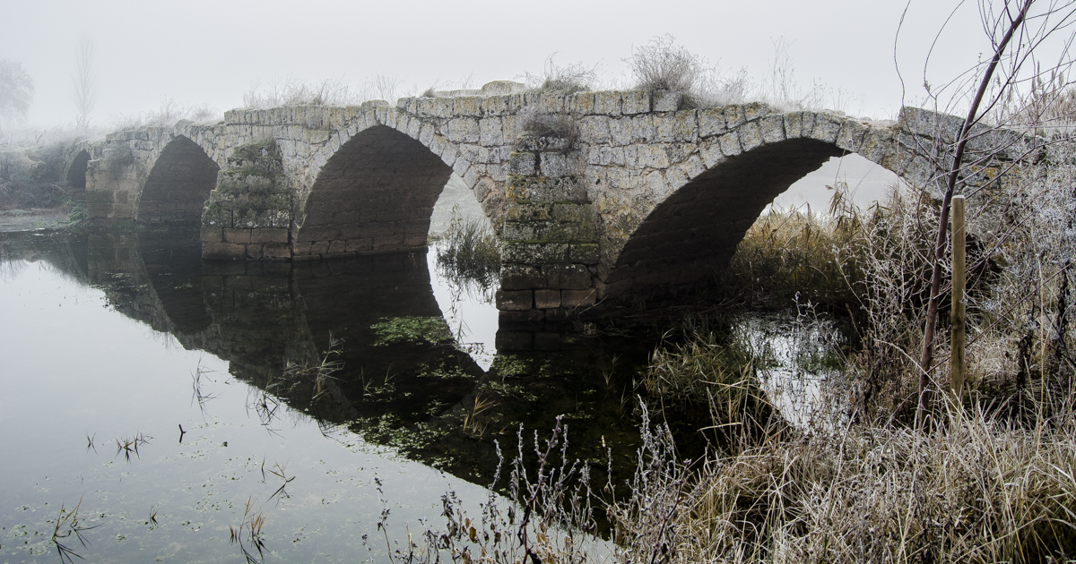 Puente Romano de Trisla. Sasamón. España.